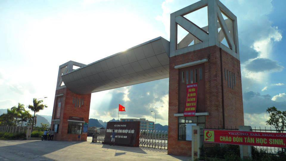 cơ sở 3 tọa lạc tại TP Phủ Lý tỉnh Hà Nam